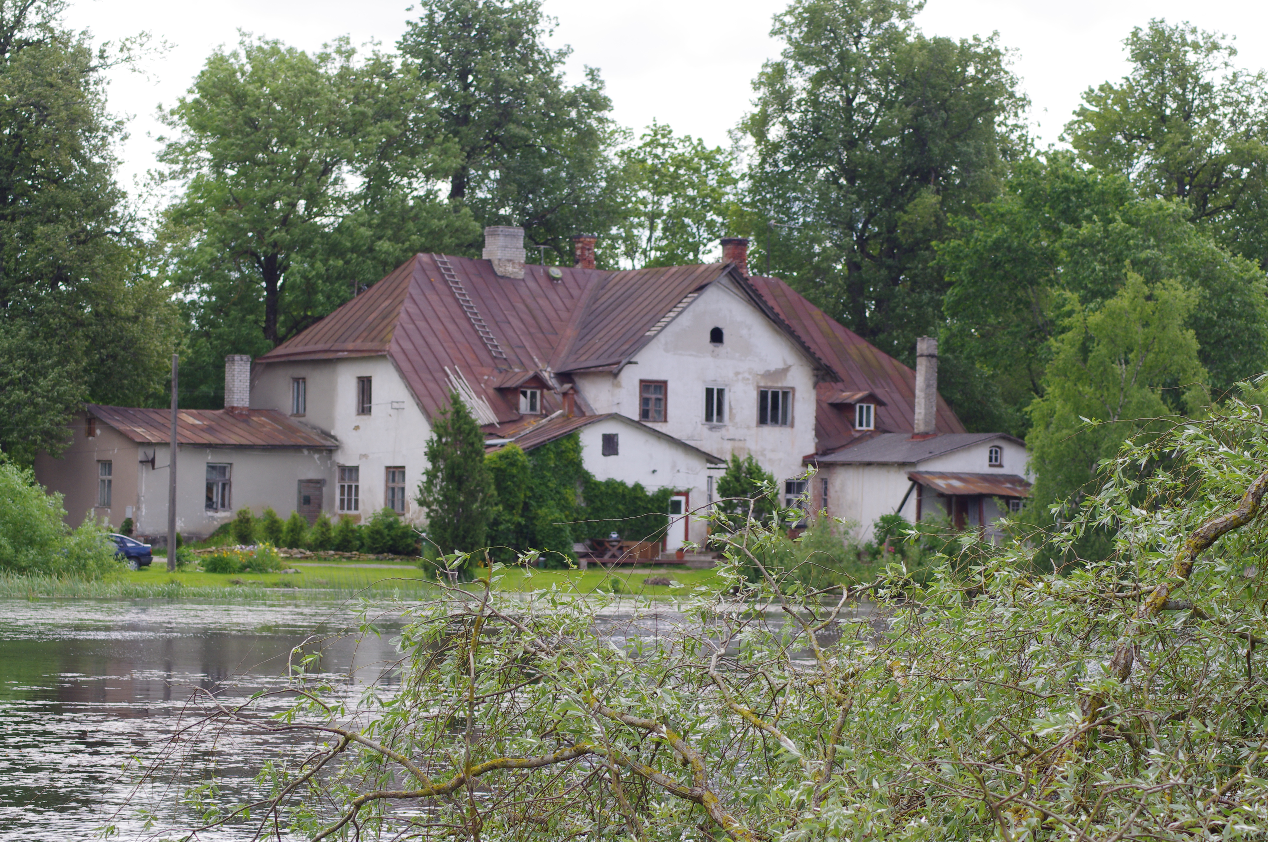 Jõgeva mõisa peahoone